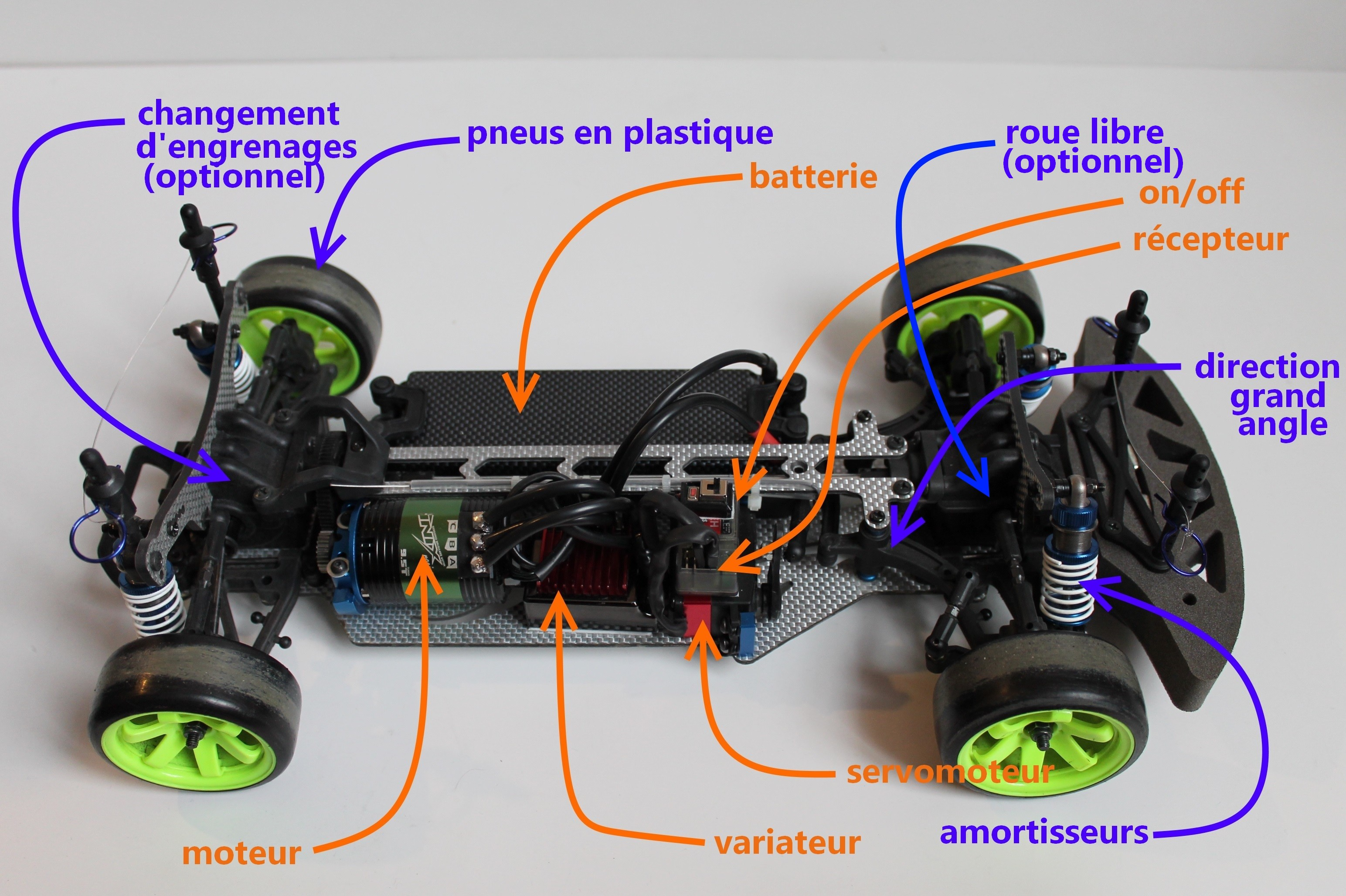 Chassis professionnel de RC Drift, ici un Yokomo MR4 TC SD avec des éléments en carbone optionels. L'image montre la répartition des éléments.